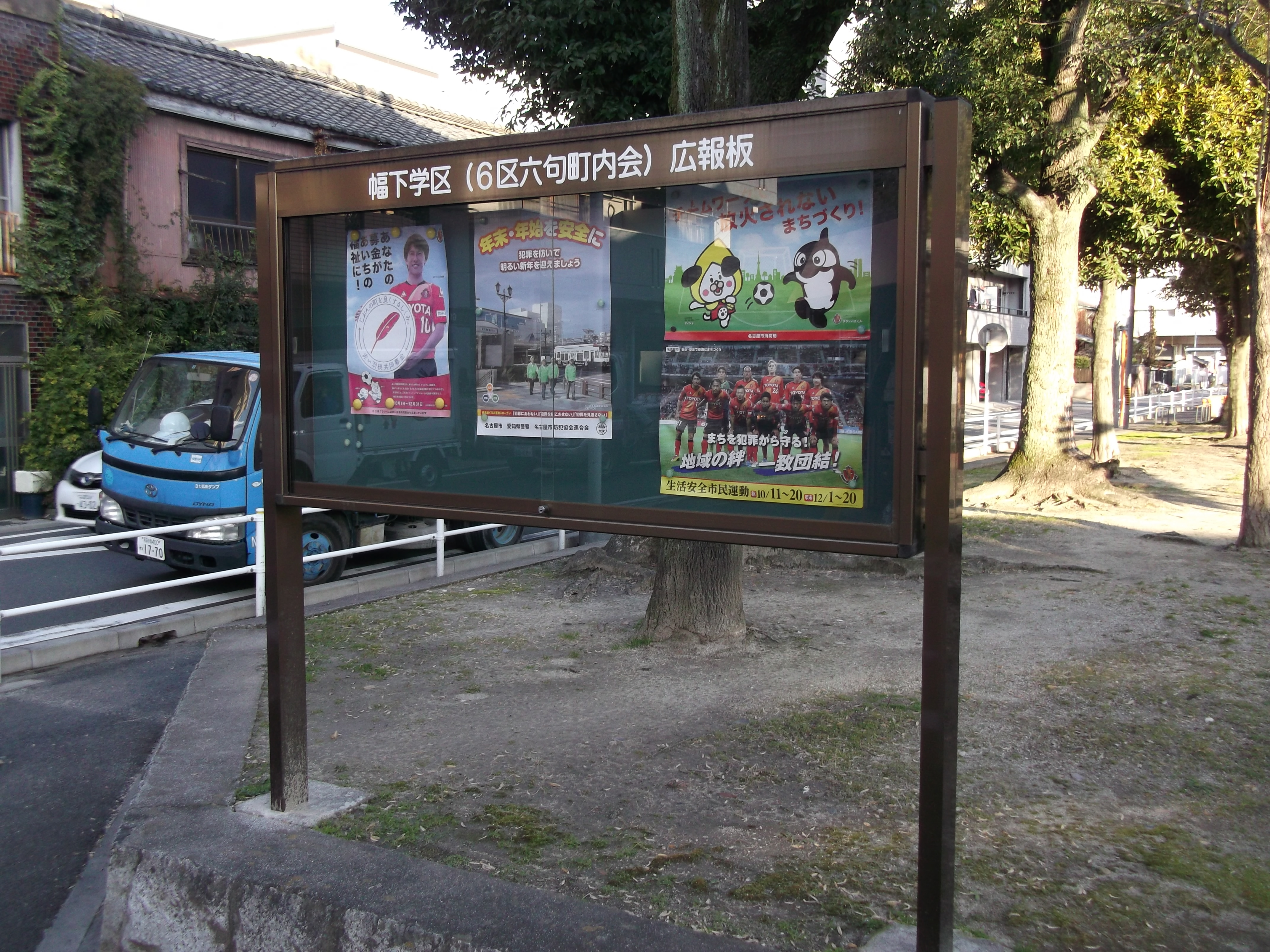 名古屋市西区の幅下公園北西角に設置されている「六句町」の表記がなされた広報用掲示板